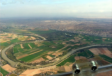 Vista aérea oblicua del Galacho de Juslibol.